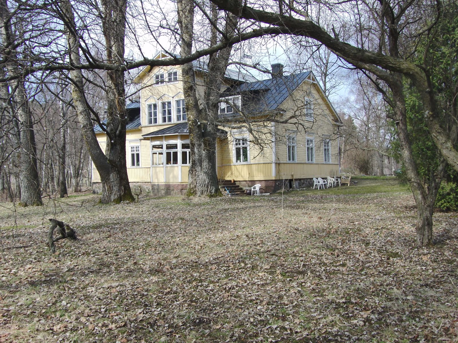 Soukanpohjan kartanon vanha päärakennus